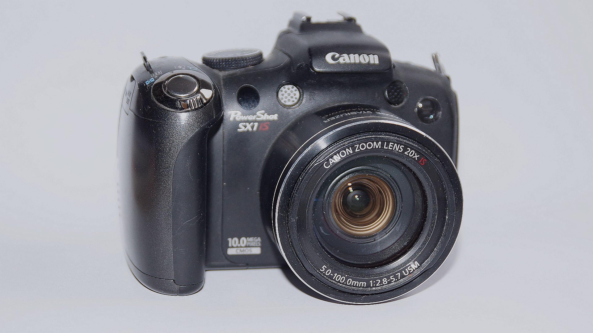 Canon SX1 iS - Bridgecamera Zoom 1:2.8-5.7 28-560mm (KB) - Foto Wolfgang Pehlemann DSC04895